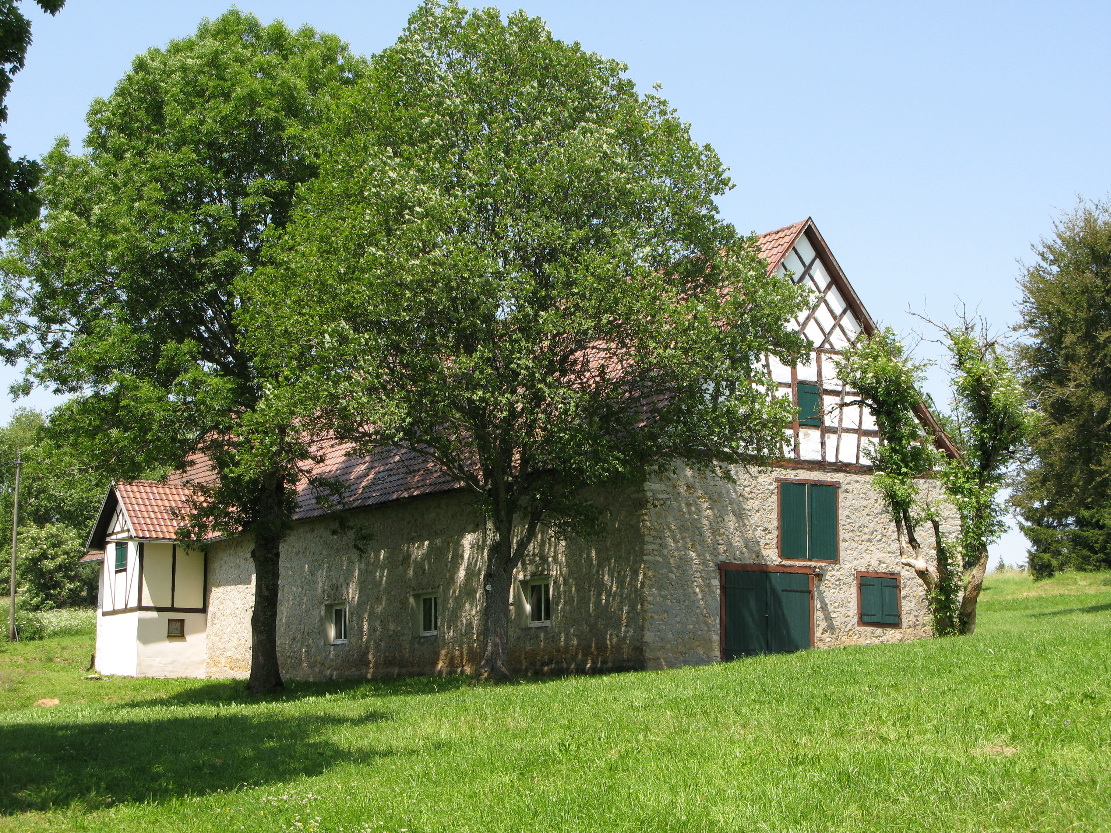 Allensbacherhof bei Böttingen am Donauberglandweg auf der Schwäbischen Alb.